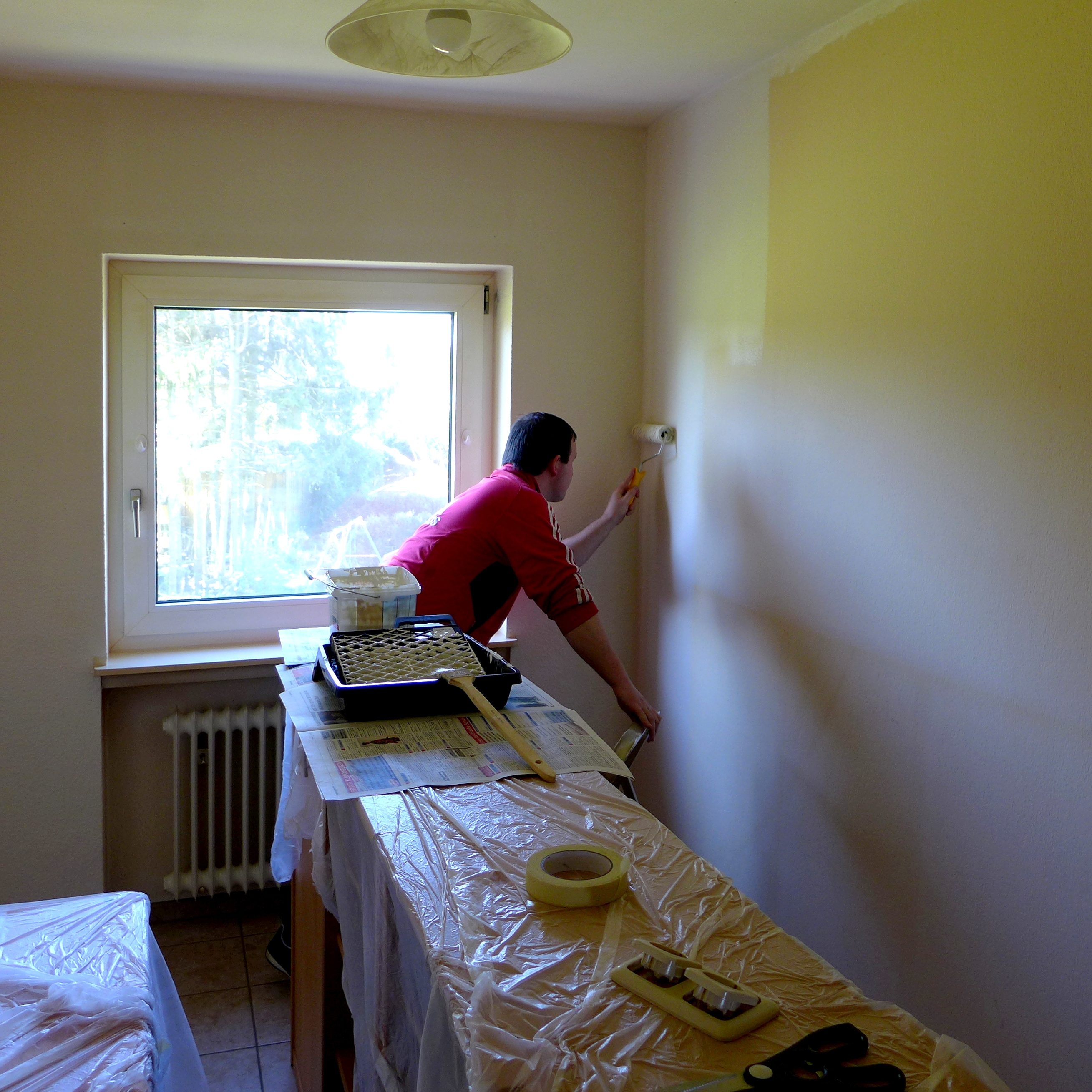 Ein Heimwerker beim Streichen einer Wand mit einem Farbroller.